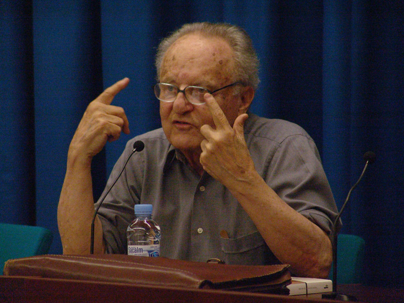 Gabriel Jackson en una conferencia en la Universidad de Barcelona